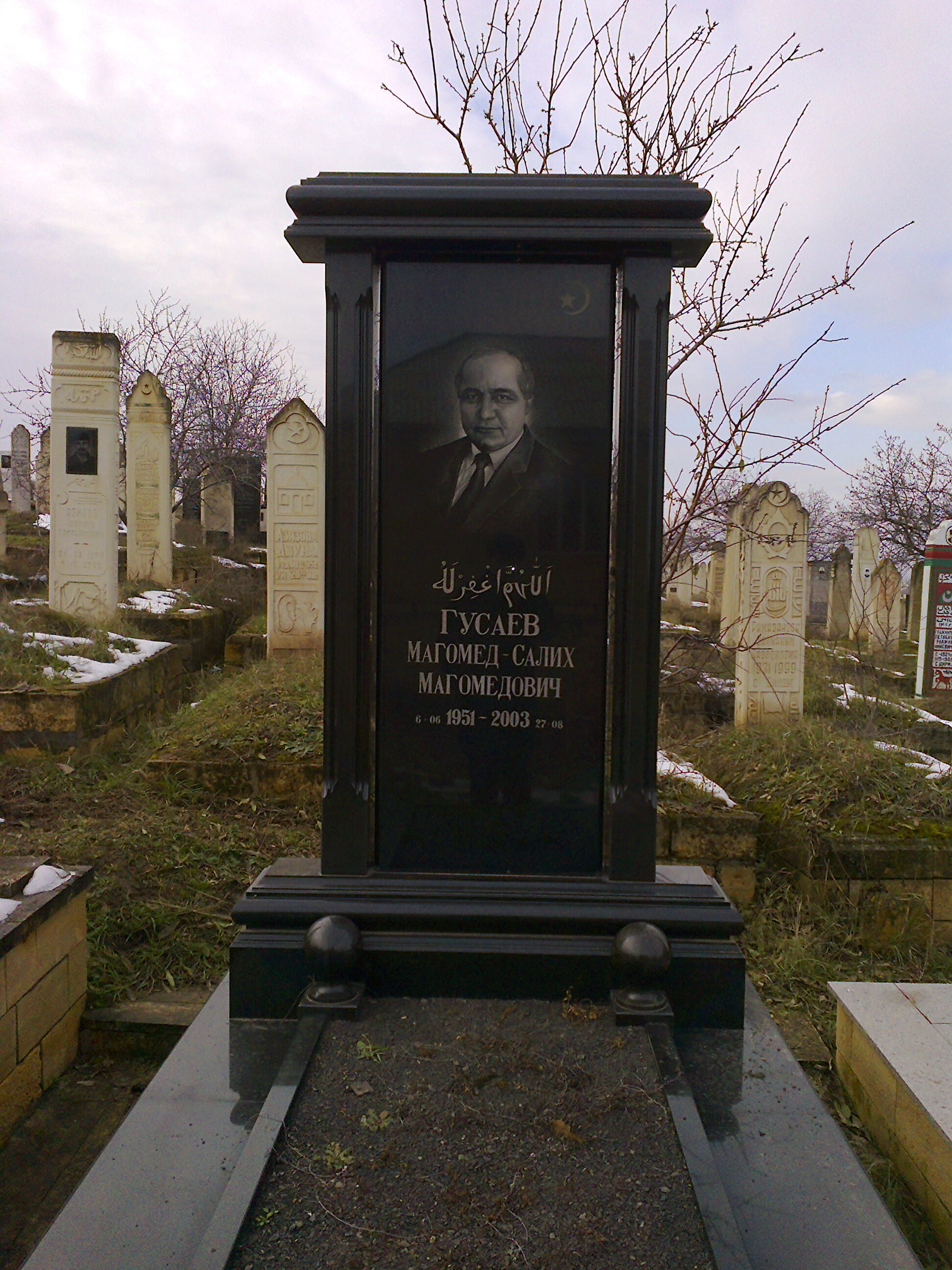 Надмогильный памятник Магомедсалиха Магомедовича Гусаева на Чинарском кладбище